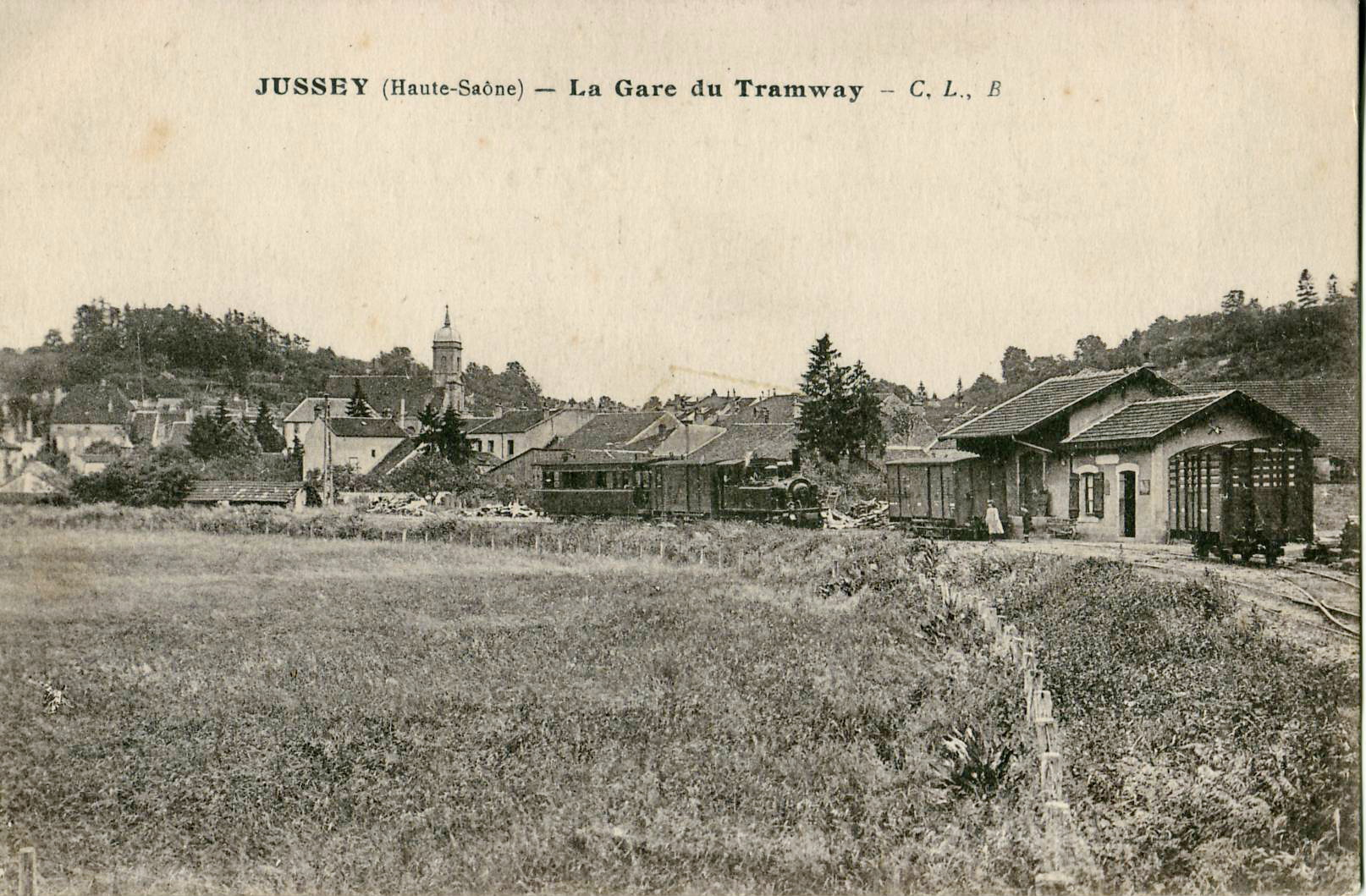 Carte postale ancienne éditée par C. L., B. : JUSSEY - La Gare du Tramway